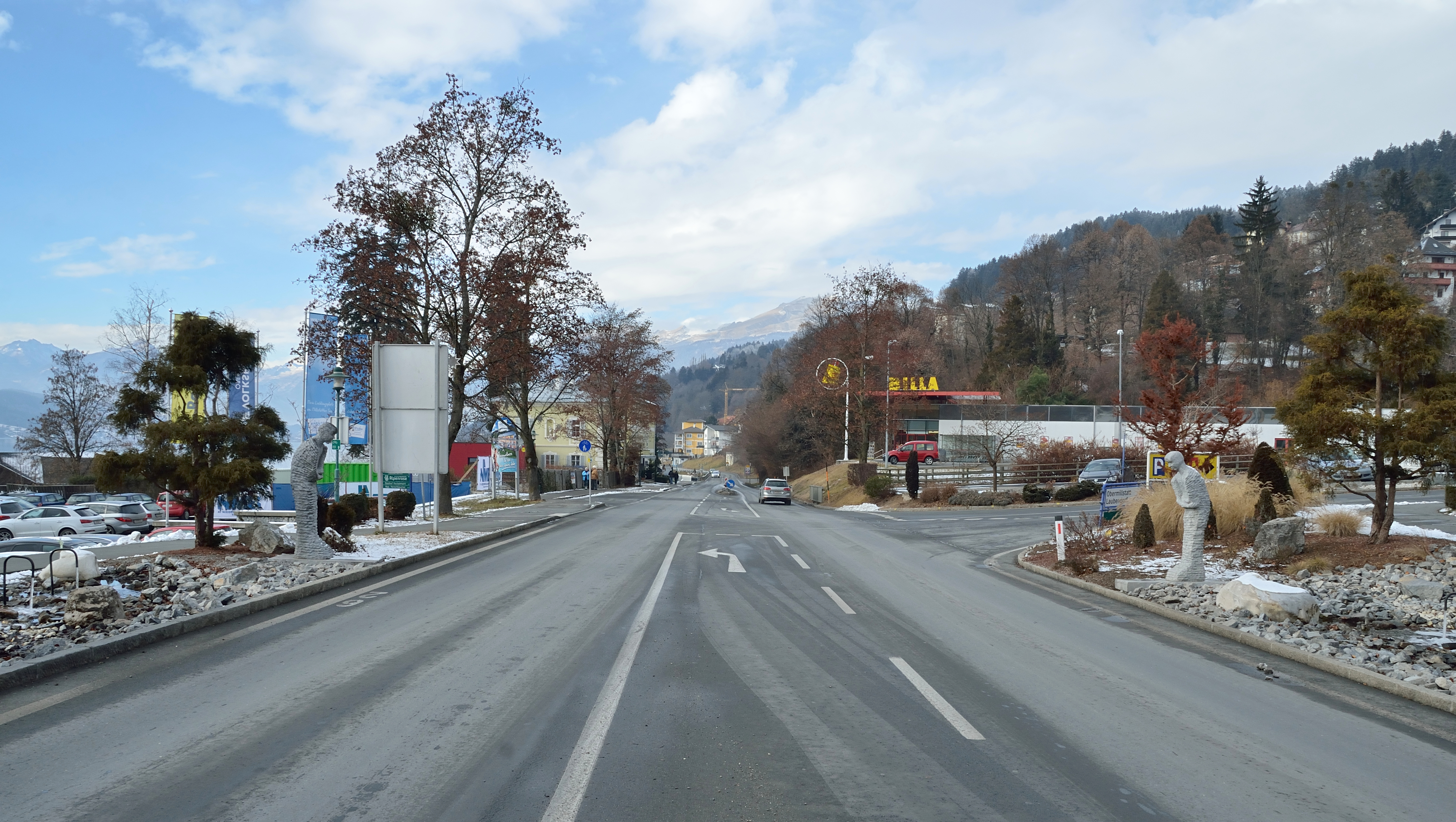 2 Skulpturen in Millstatt an der B98, Mann und Frau.